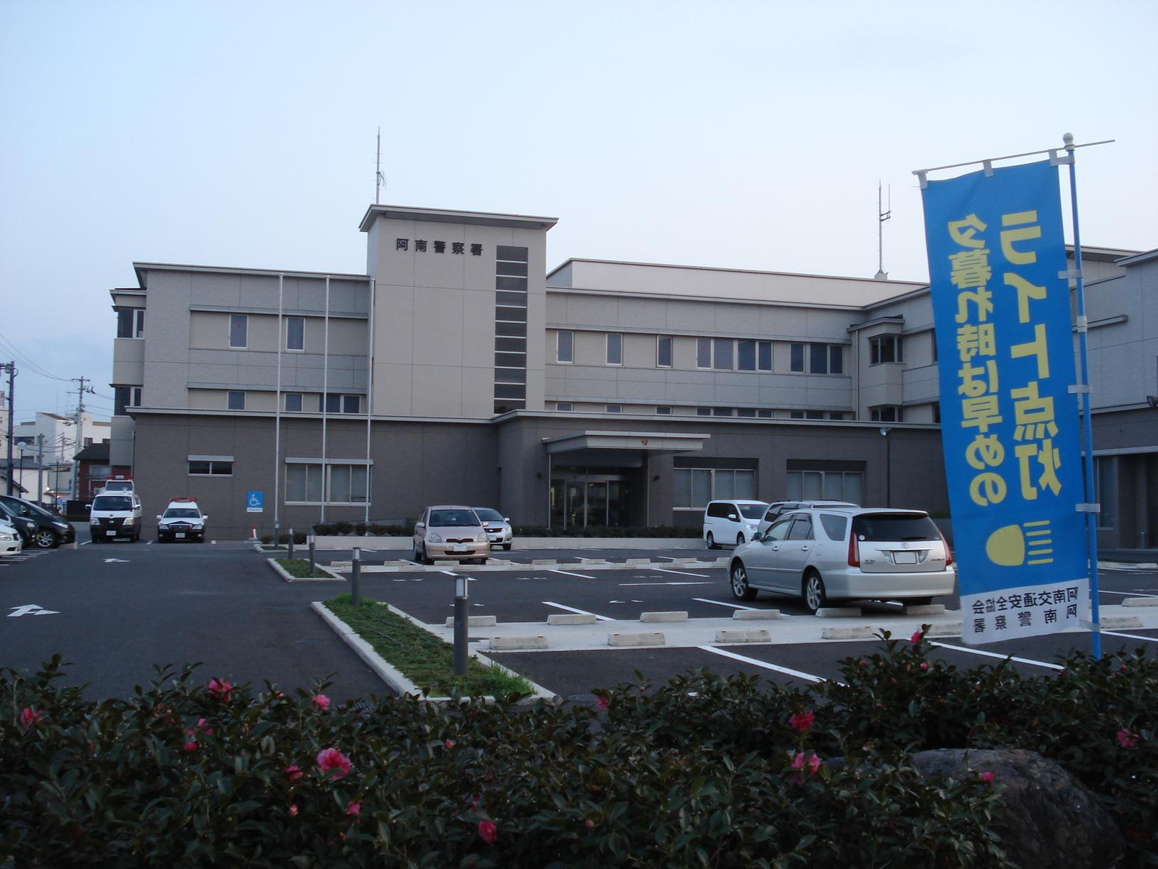 2010年3月13日午後 投稿者本人が撮影。